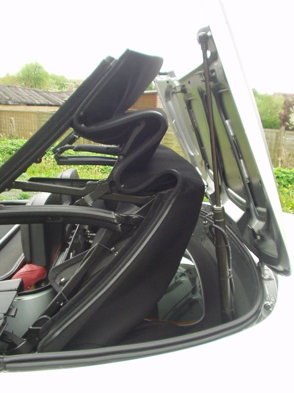 Cabriodach eines Opel Astra G in Bewegung